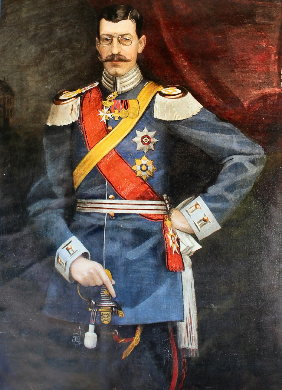 Herzog Wilhelm II von Urach